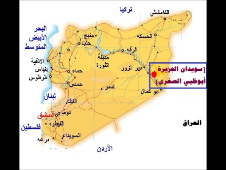 موقع قرية سويدان الجزيرة